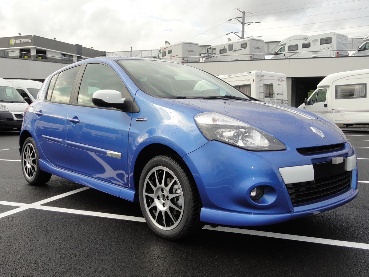 La Renault Clio III Gordini présentée dispose d'une motorisation 1.5 DCI 105ch. Il ne s'agit pas d'une Clio RS mais d'une évolution de la Clio GT.